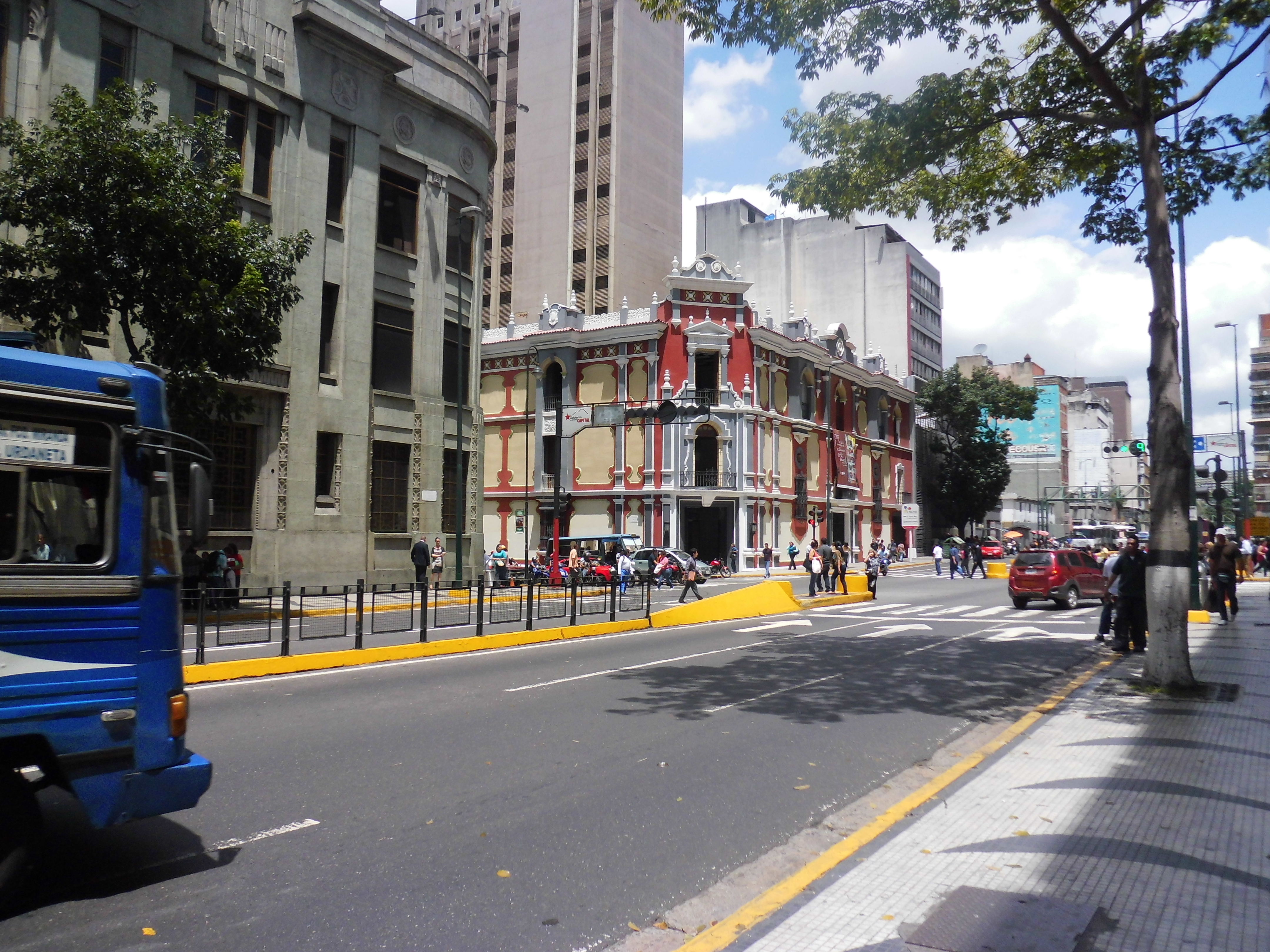 Edificio del correo de Carmelitas en la avenida Universidad esquina de Carmelitas en la ciudad de Caracas, Distrito Capital - Venezuela